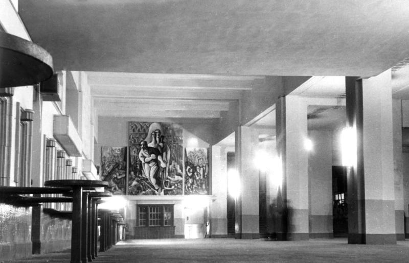 Berlin, Bahnhof, Wandgemälde Berlin: Bahnhof Friedrichsstraße 1948 Das Wandgemälde des Malers Horst Strempel im Bahnhofsgebäude ist vollendet.